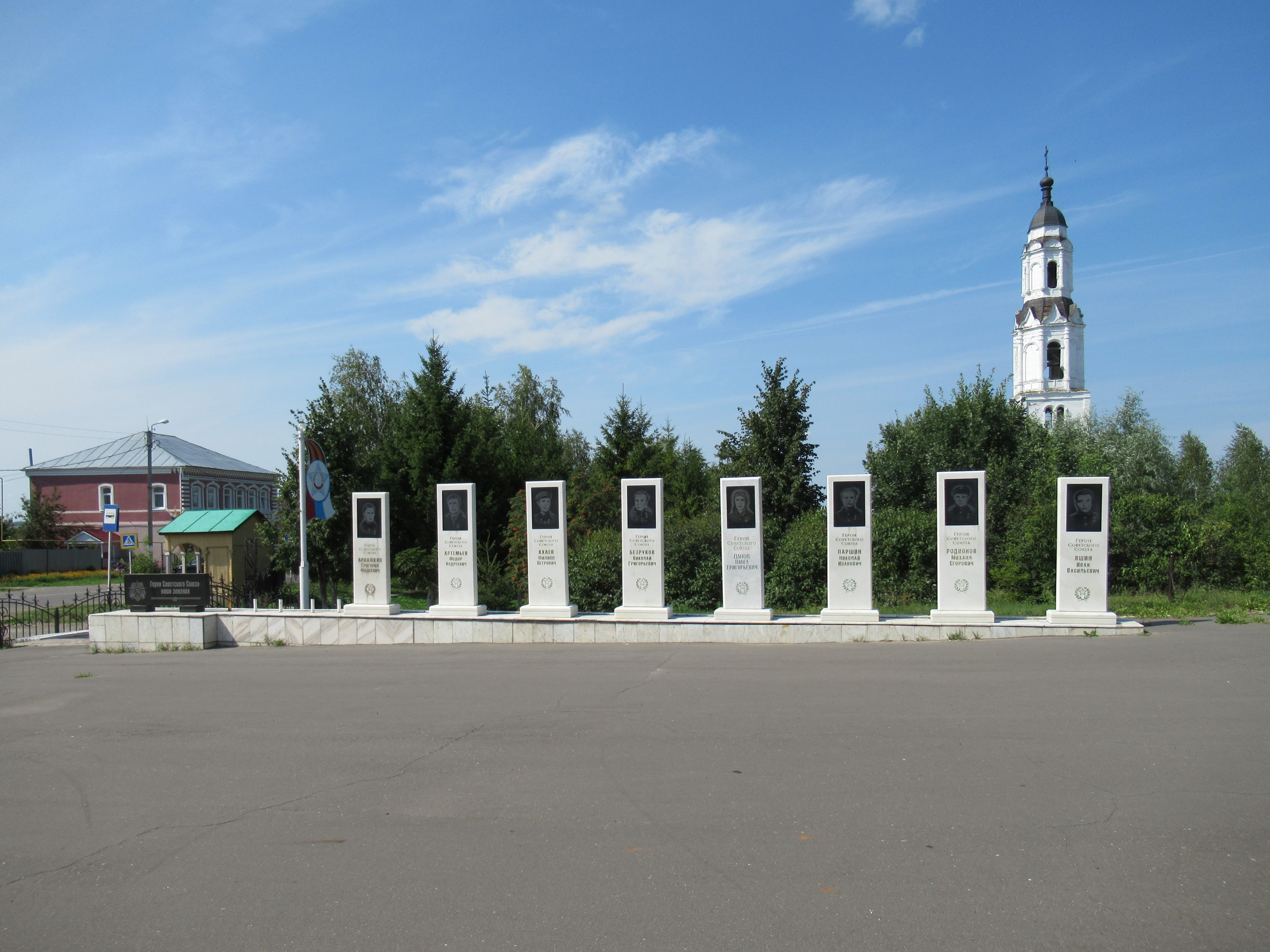 Колокольня: улица Комсомольская, 1, Порецкое, Порецкий район, Чувашия